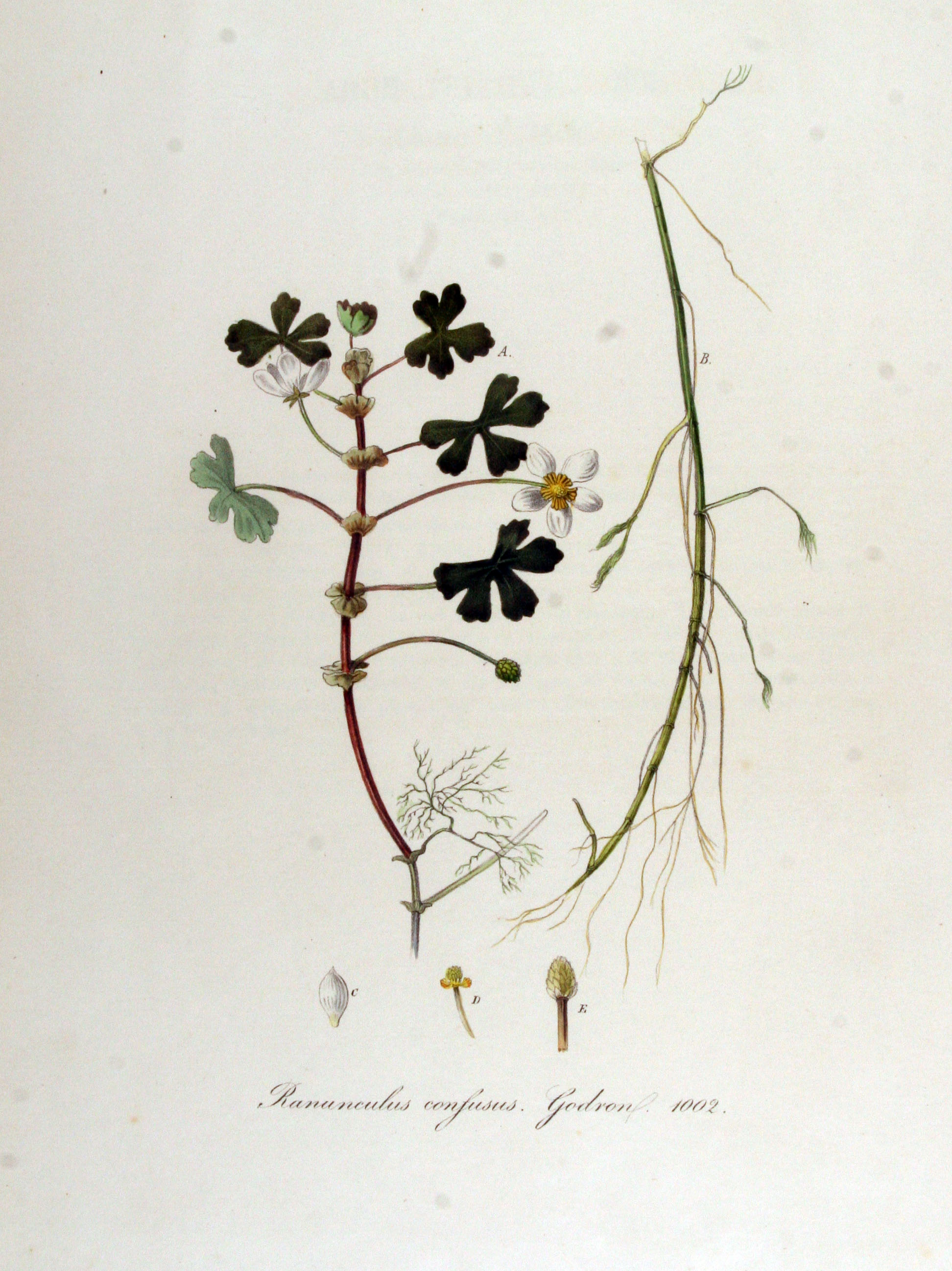 Ranunculus baudotii Godr. (Syn. Ranunculus confusus Gren. & Godr.)